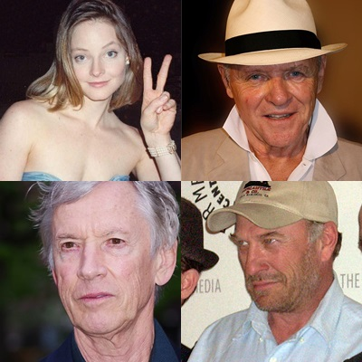 Skuespillerne bak Nattsvermeren (1991).